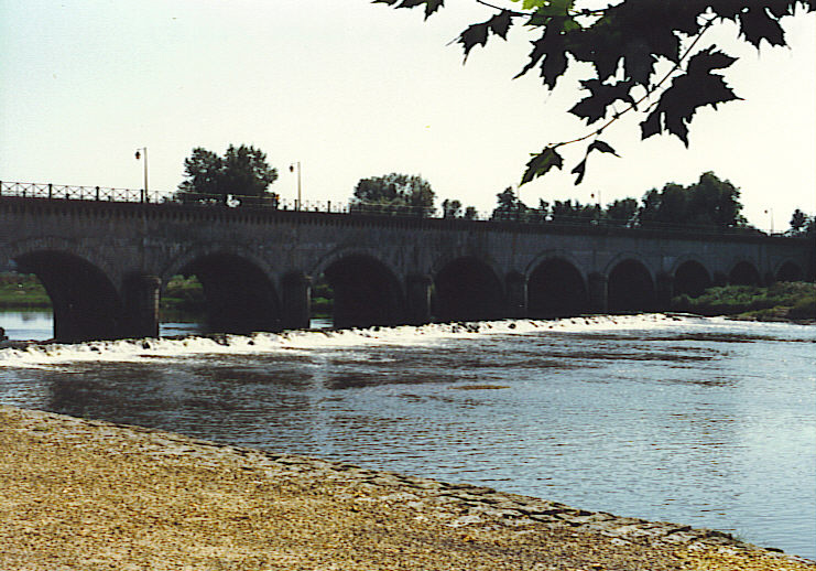 self made